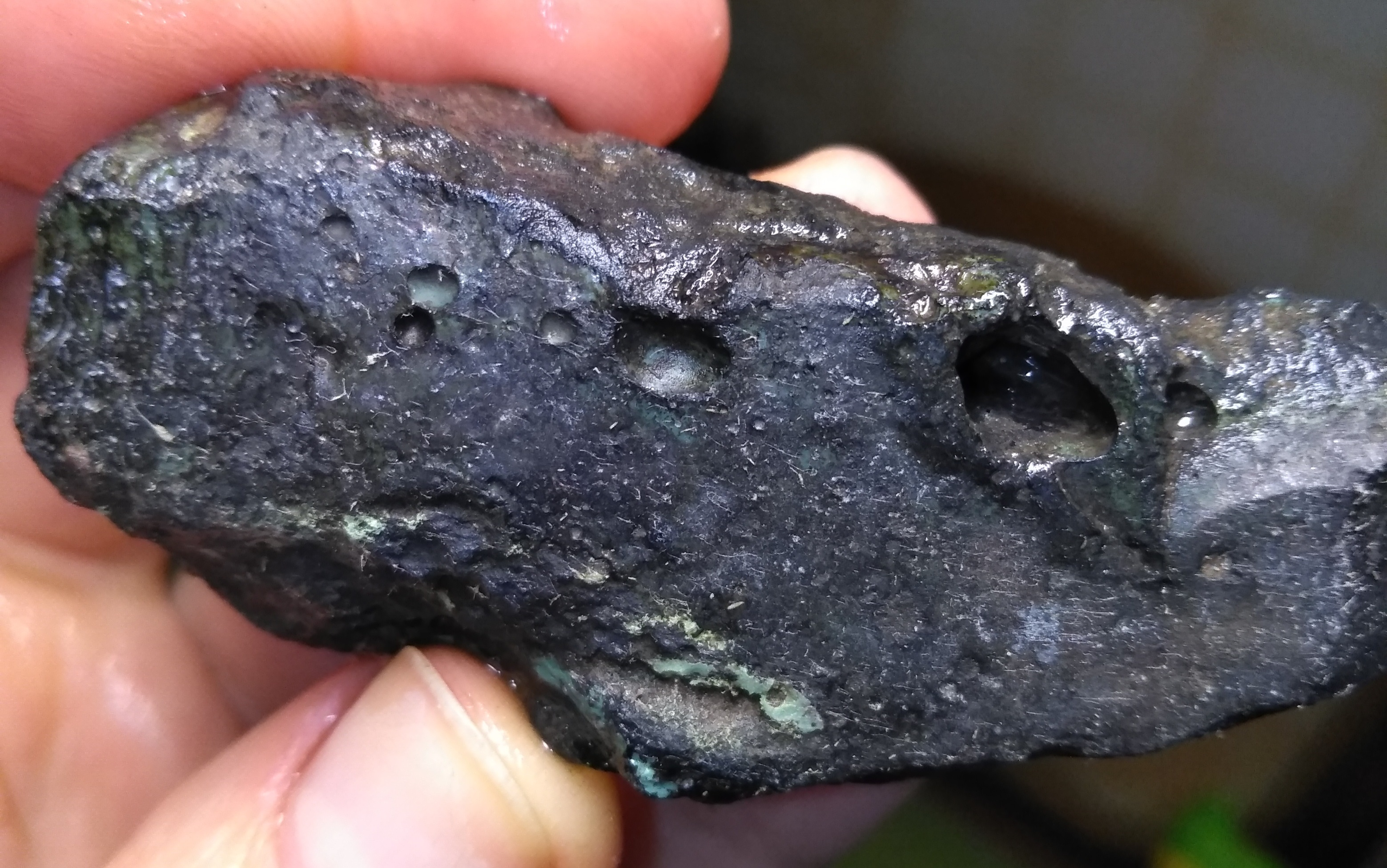 Шлак з виробництва марганцевих феросплавів Нікопольського заводу феросплавів